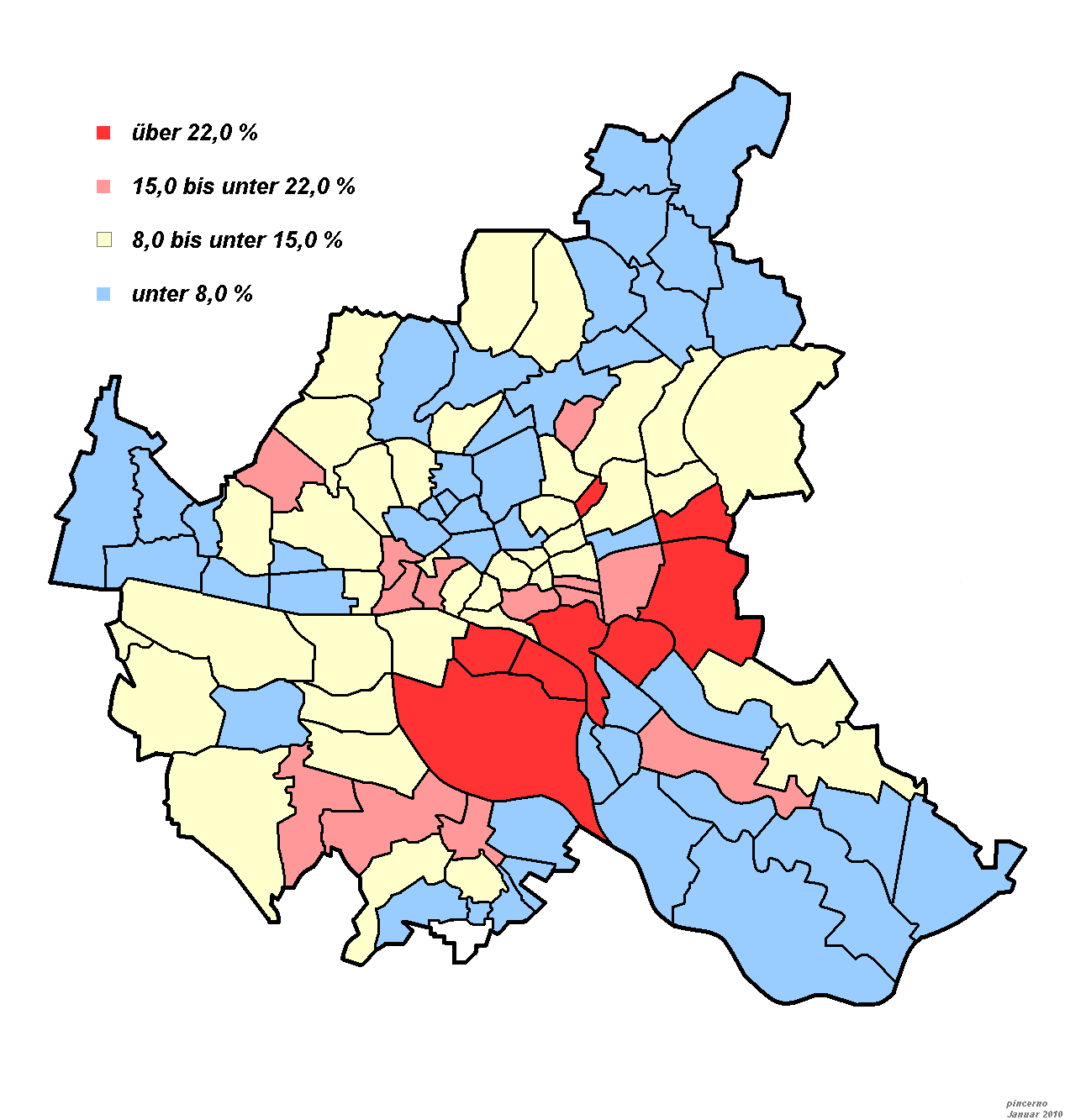 Leistungsempfängerstruktur in Hamburg; zu Name und Lage der einzelnen Stadtteile siehe Bezirke in Hamburg und Liste der Bezirke und Stadtteile Hamburgs.